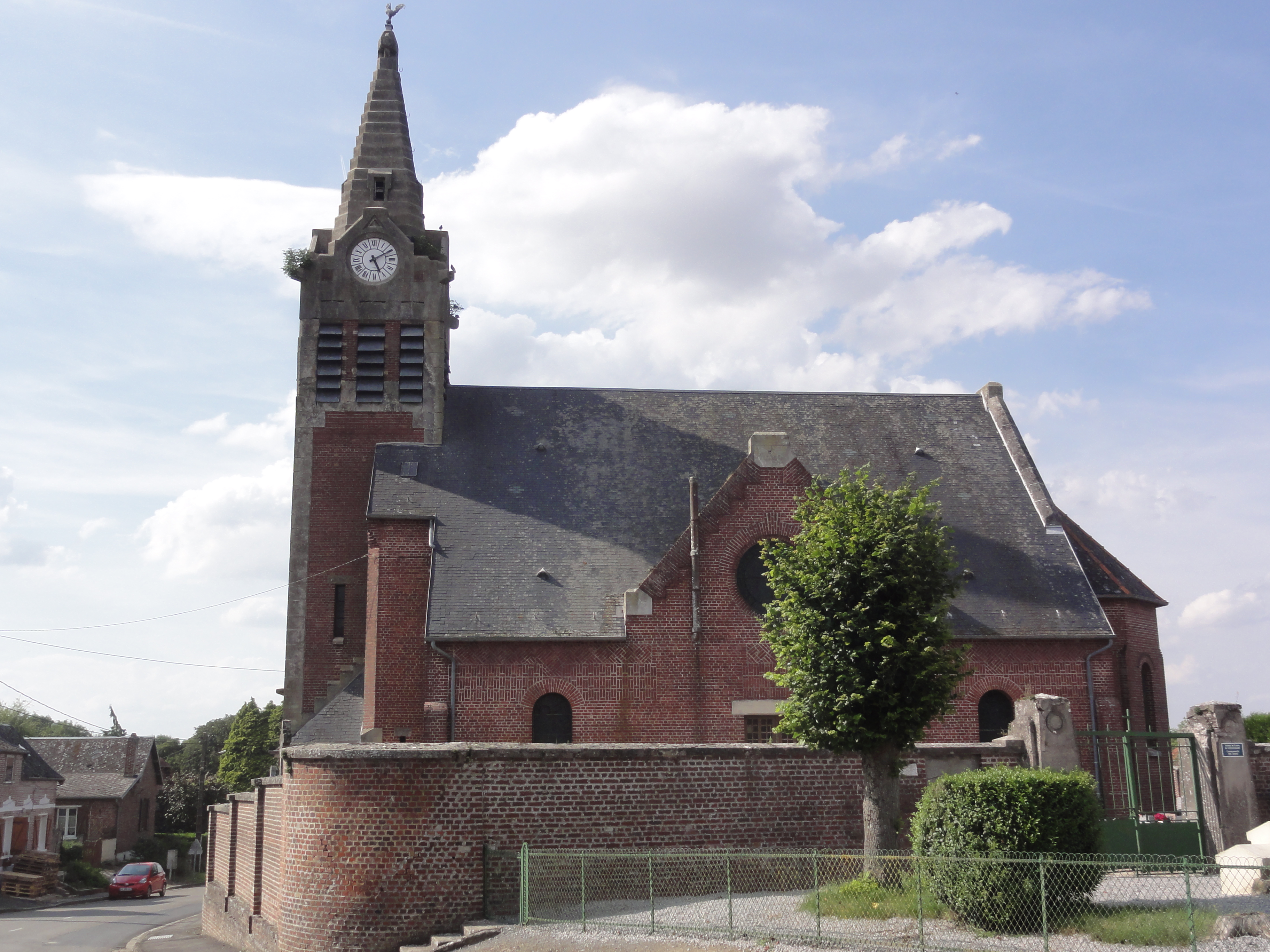 Le Verguier (Aisne) église